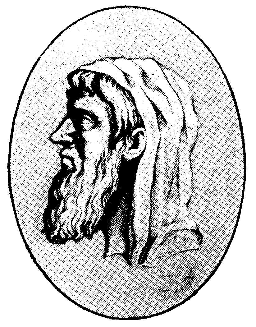 Euklides från Megara. (Efter ett antikt mynt.)